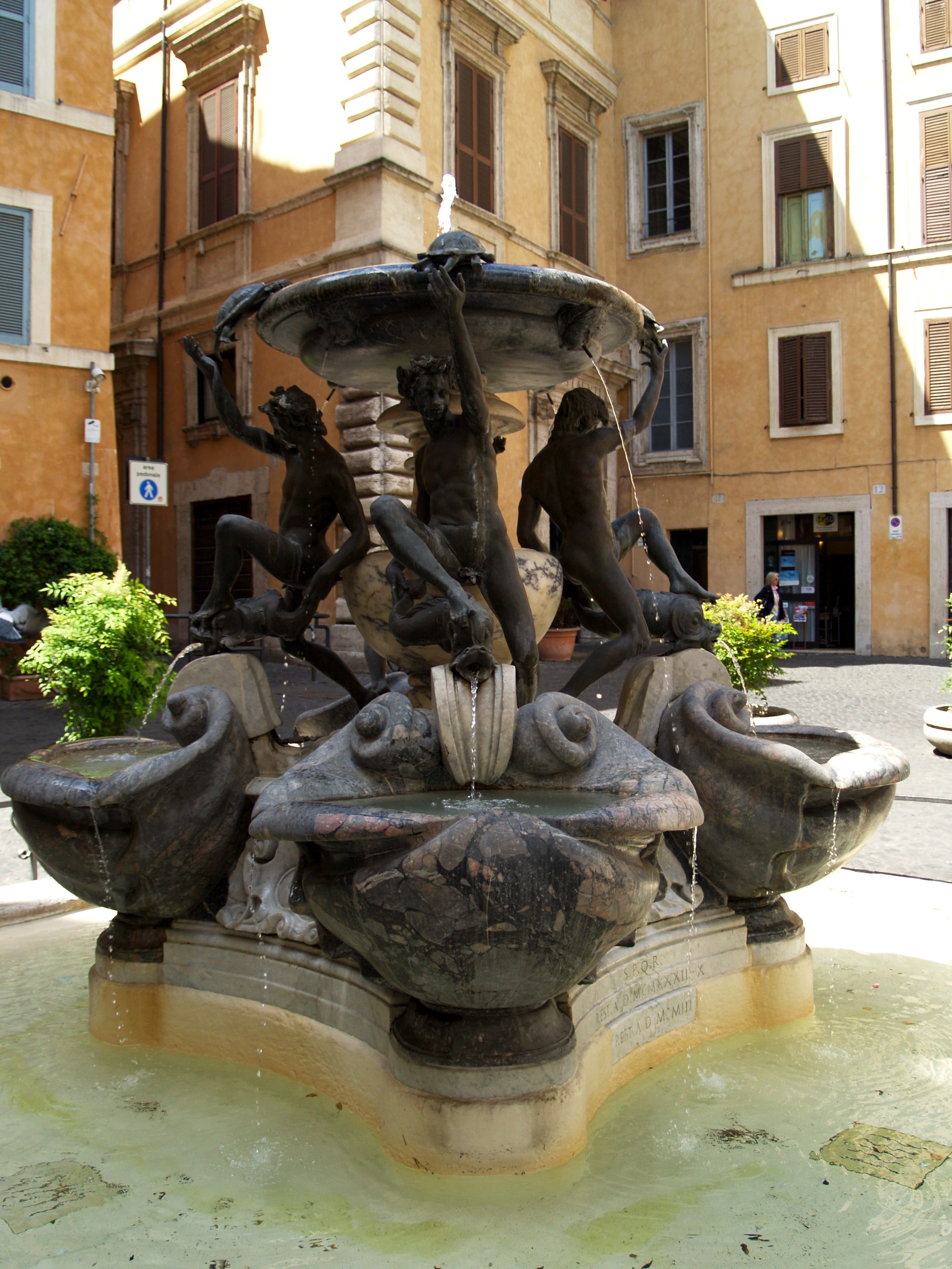 Roma, fuente de las tortugas.